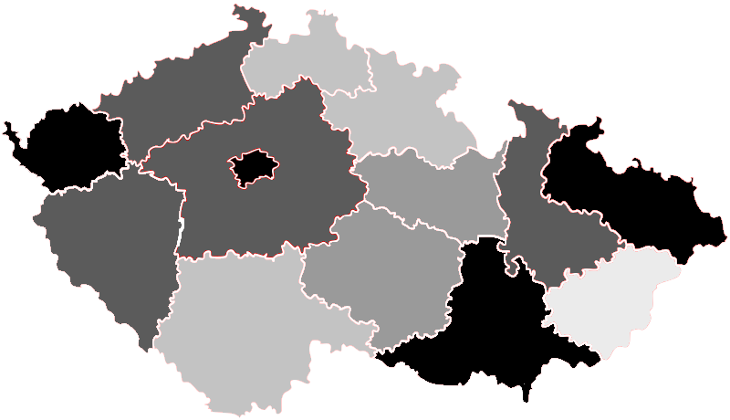 Počet úmrtí v Česku podle krajů na nemoc covid-19